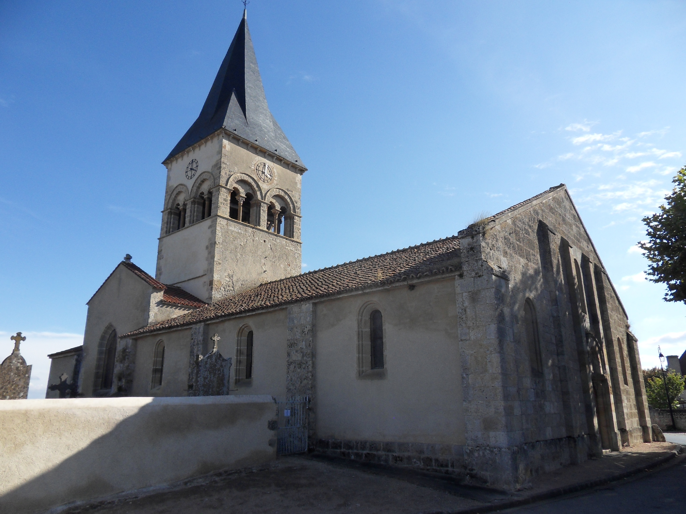 Église Saint-Martial, (Inscrit, 1927)